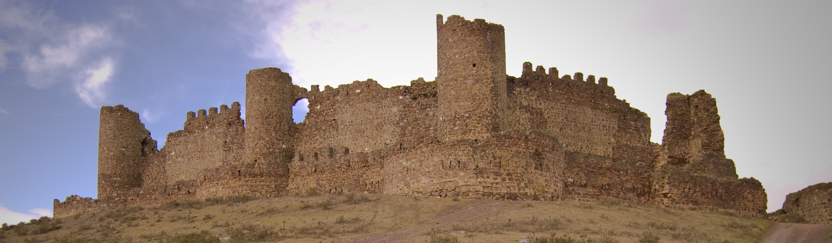 Castillo de Almonacid, en Almonacid de Toledo, Castilla-La Mancha.